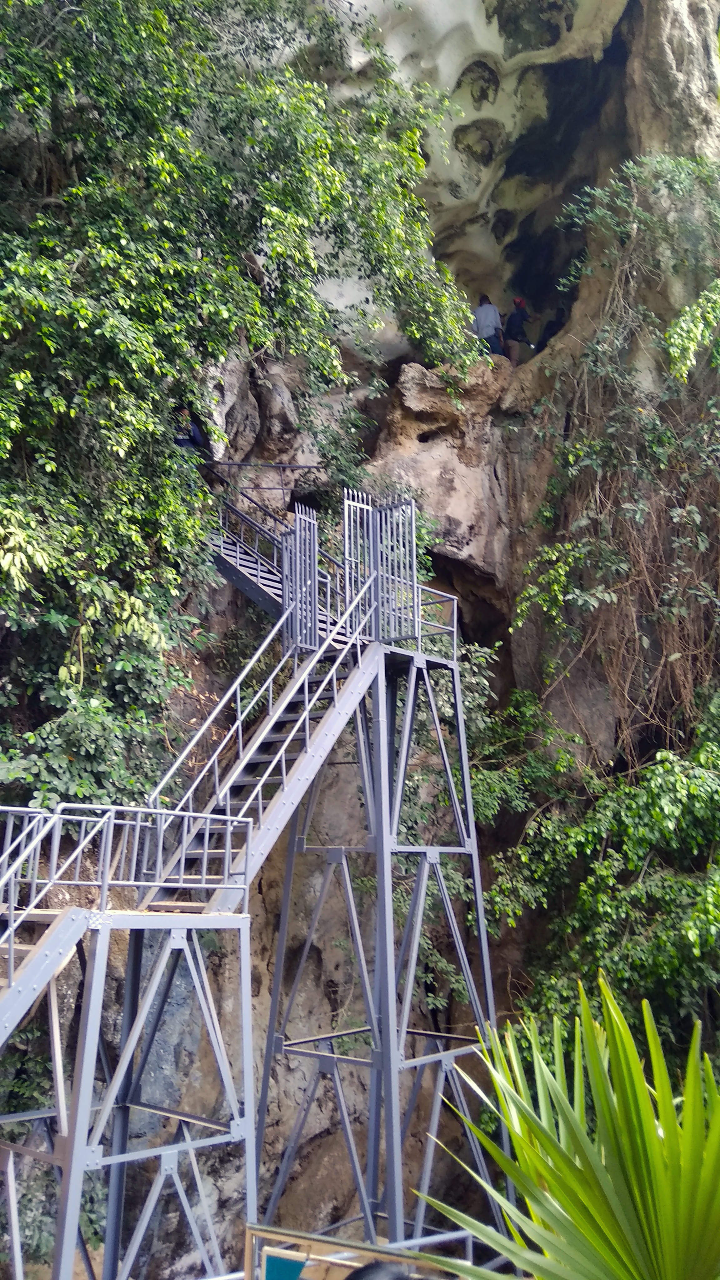 Gua Pettakere di Kabupaten Maros, Sulawesi Selatan. Gua ini merupakan tempat tinggal manusia prasejarah. Di dalamnya, terdapat lukisan tangan yang diperkirakan berusia 39.400 tahun dan lukisan babi-rusa yang berusia 35.400 tahun.